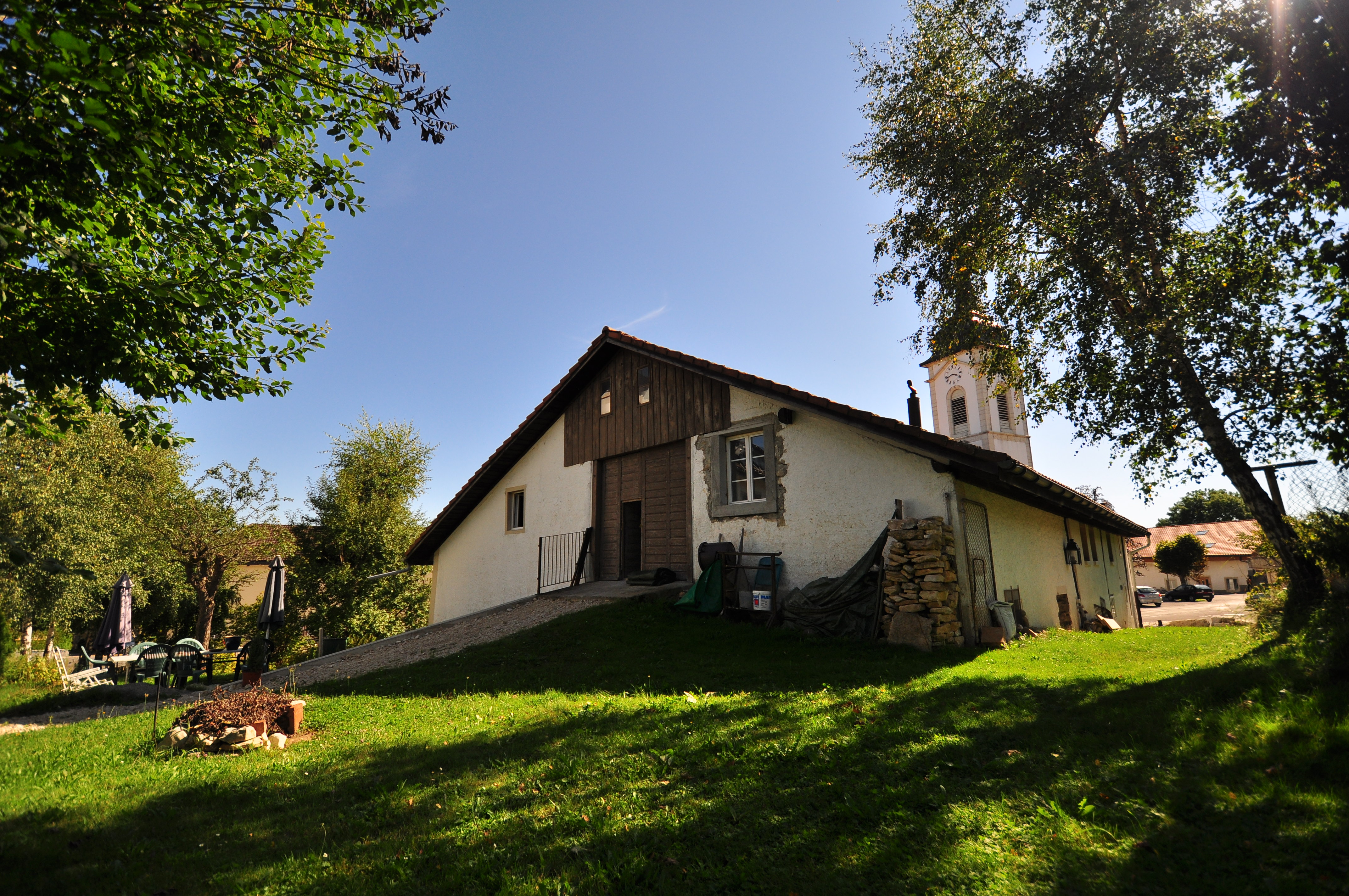 Les Breuleux Ferme 1